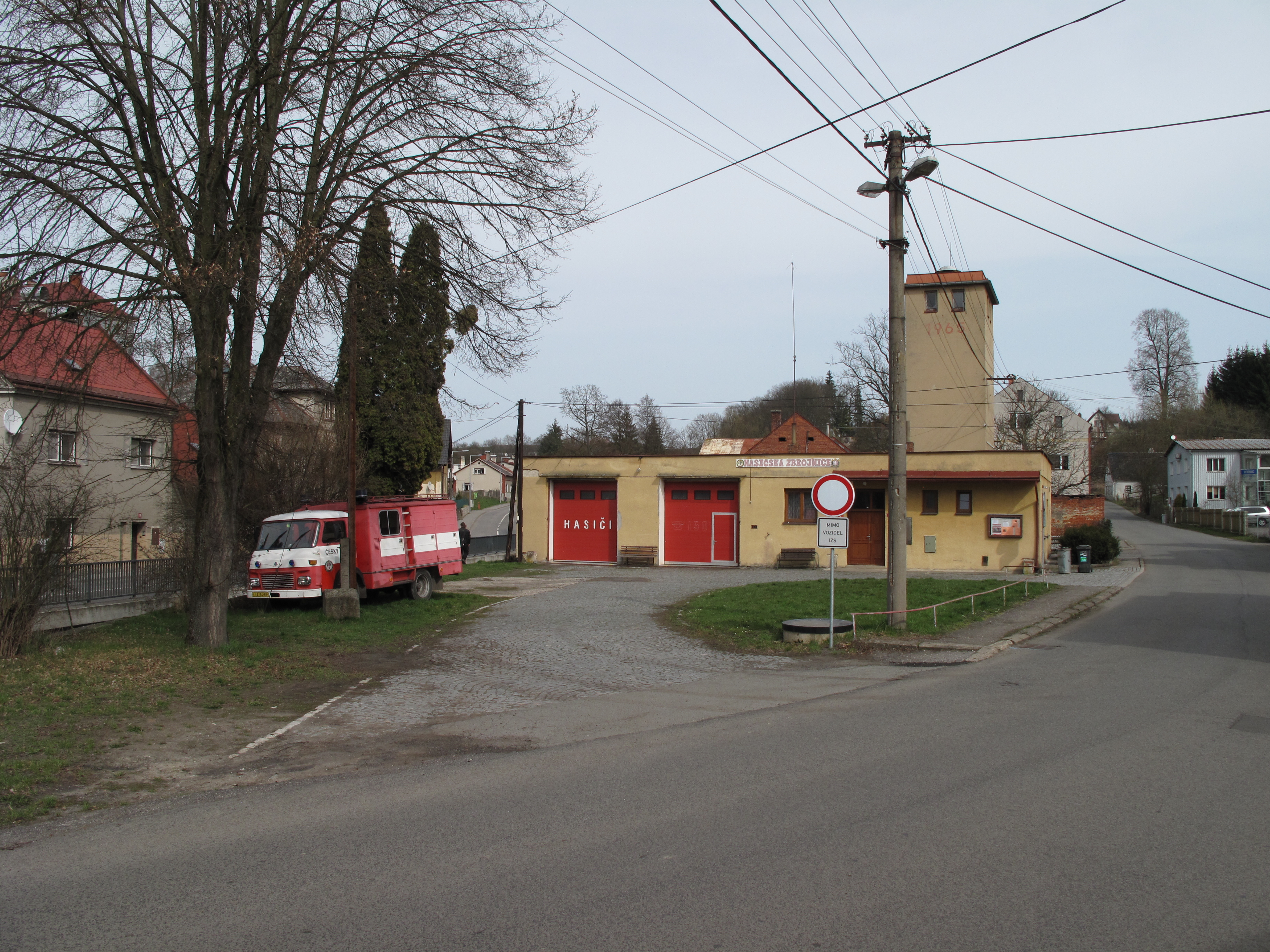 Český Dub III. Okres Liberec, Česká republika. Masarykova čp. 63, hasiči.